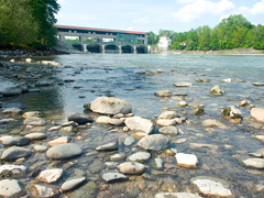 Jettenbacher Wehr